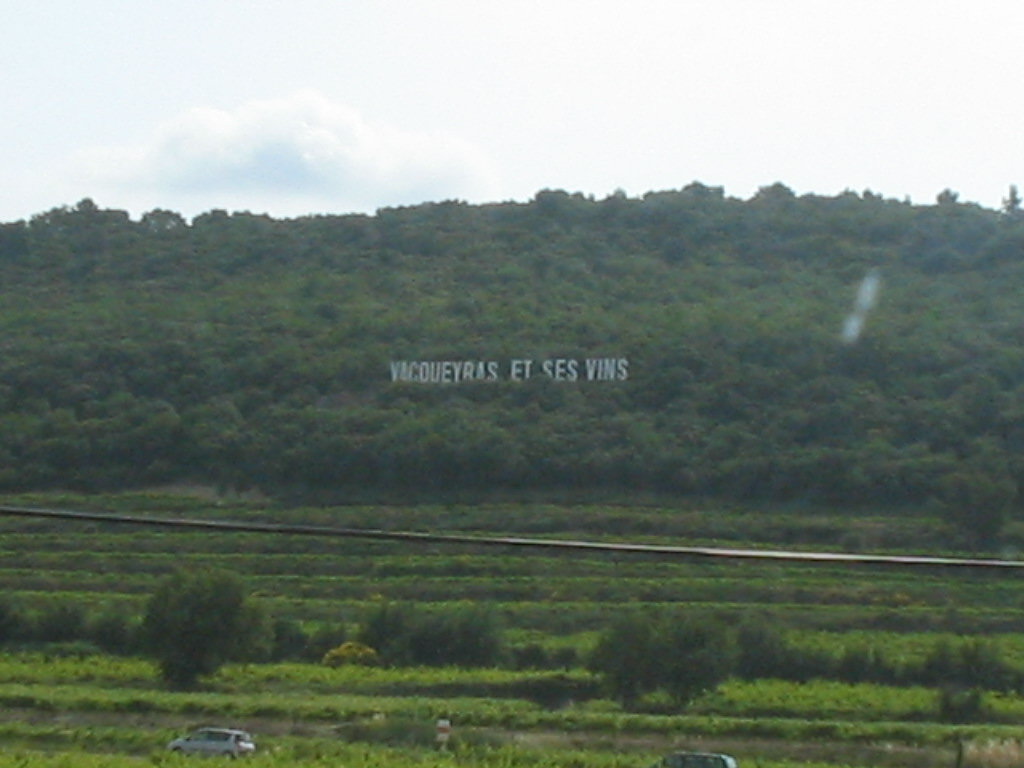 Vacqueyras